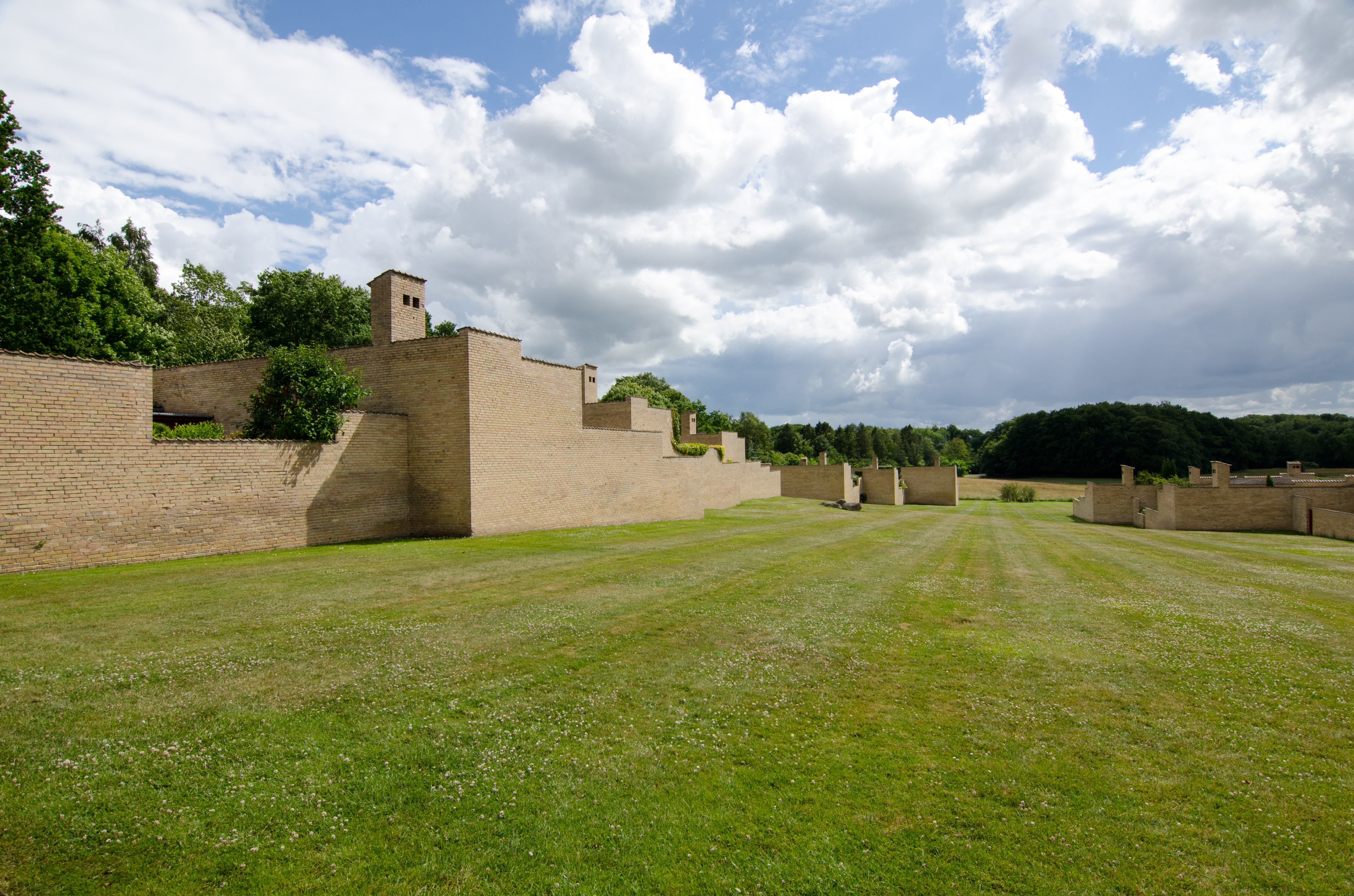 Fredensborg Housing by Jorn Utzon in Fredensborg, Denmark